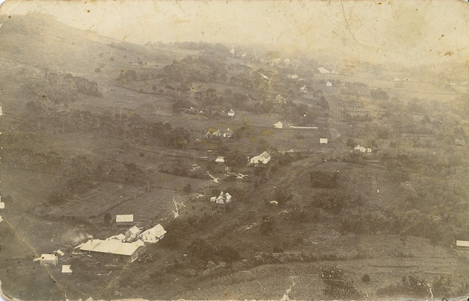 Foto antiga do município de Linha Nova.